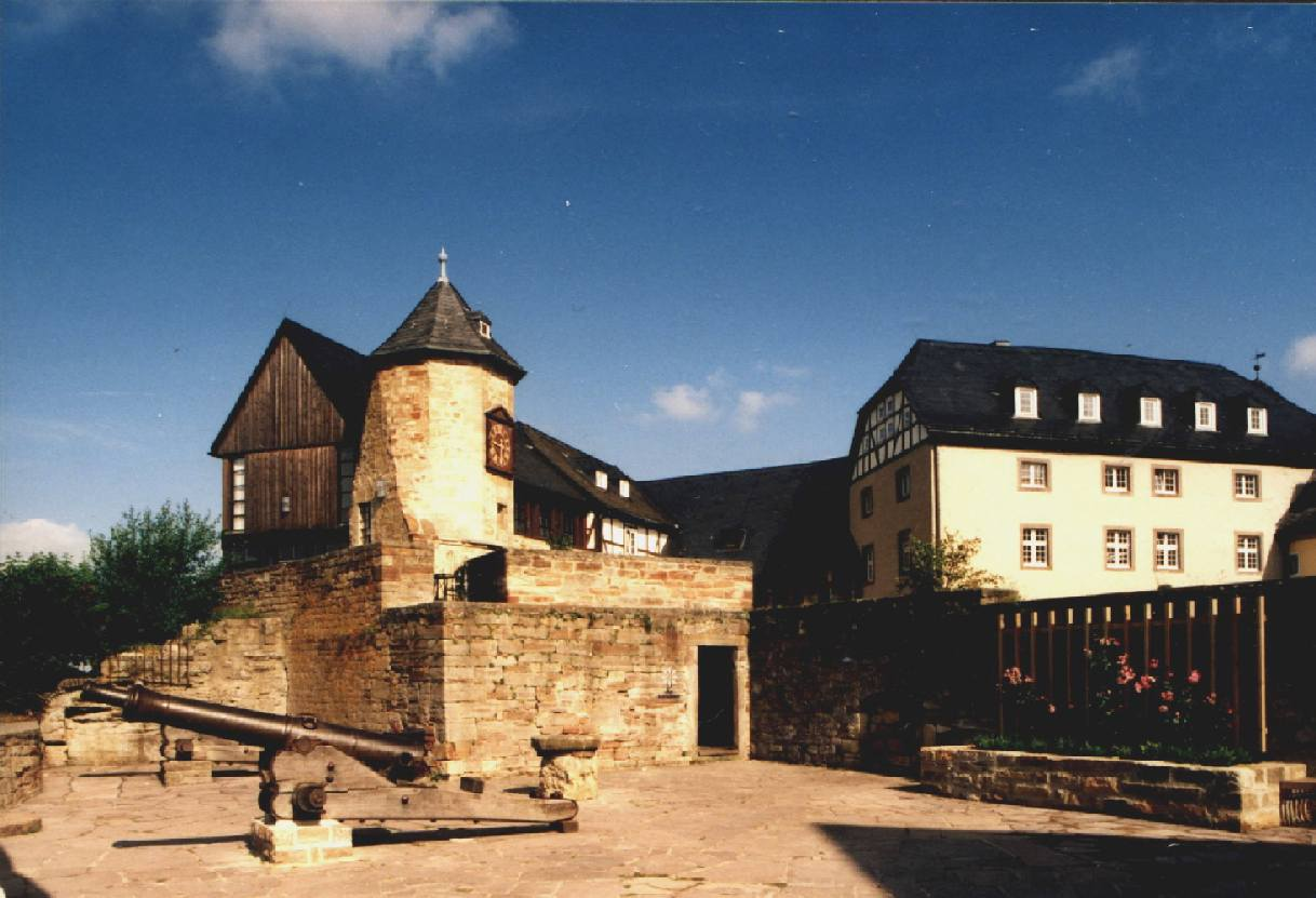 Castle Schloss Waldeck in Hesse, Germany